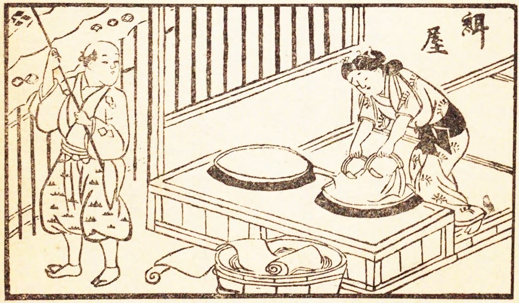 紺屋 増補江戸惣鹿子名所大全